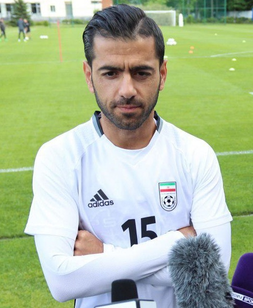 پژمان منتظری در تمرین تیم فوتبال ایران